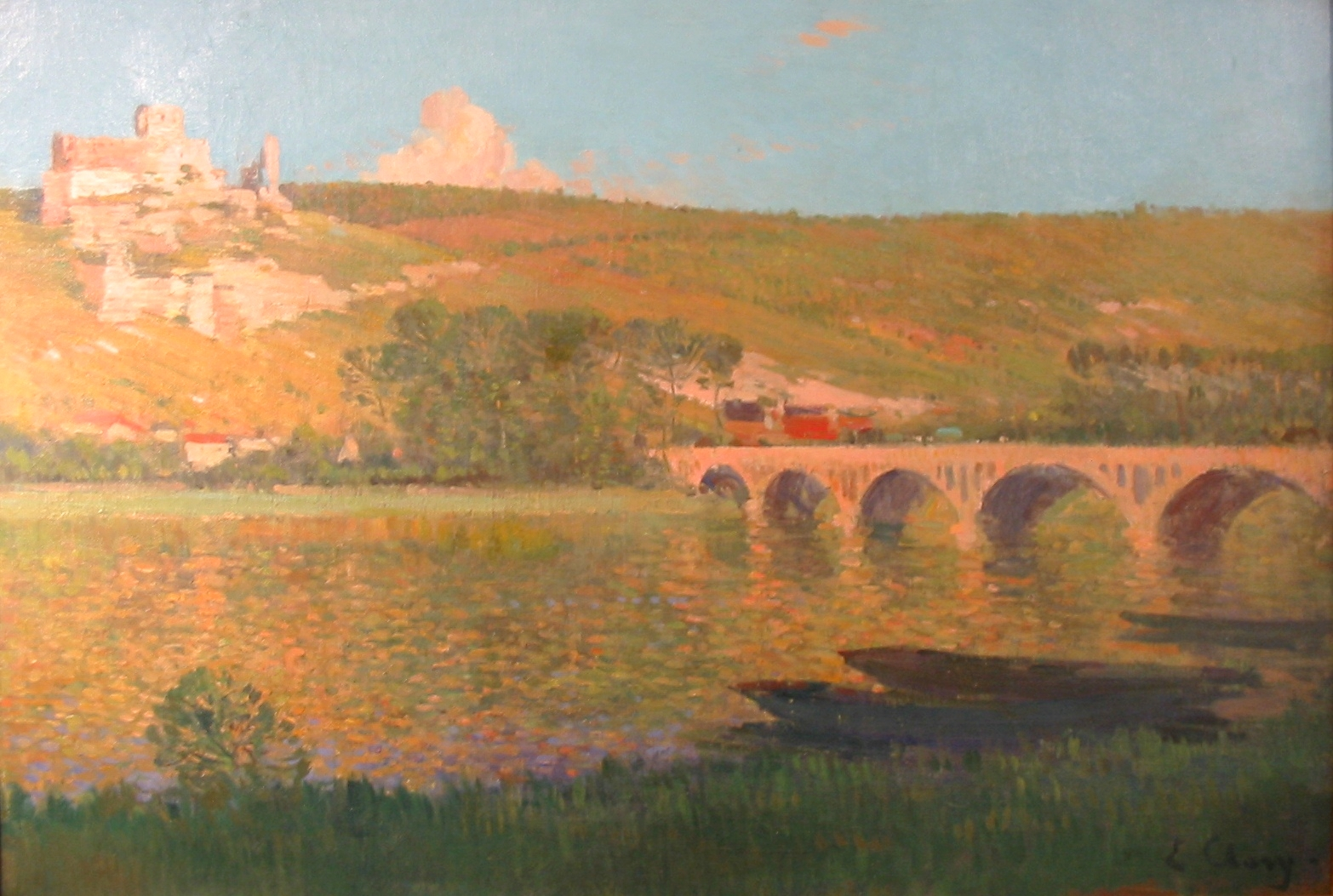 La Seine et Château-Gaillard, huile sur toile d'Eugène Clary (1856-1930). Musée Nicolas Poussin (Les Andelys, Eure, France).